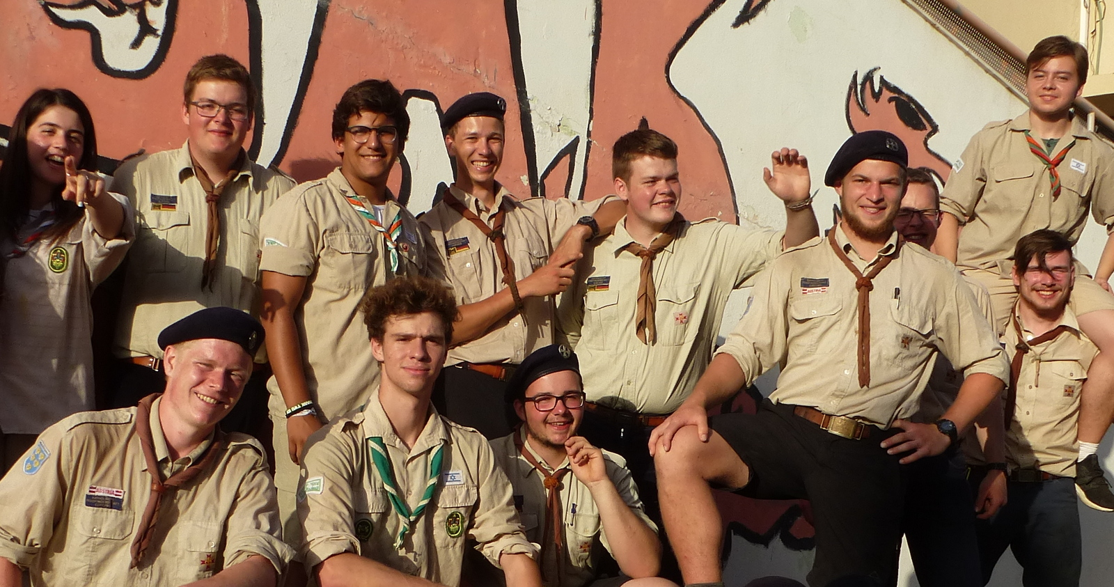 Begegnungsprojekt von Pfadfindern der KPE-Deutschland und KPE-Österreich mit israelischen Pfadfindern in Netanya, Mai 2018